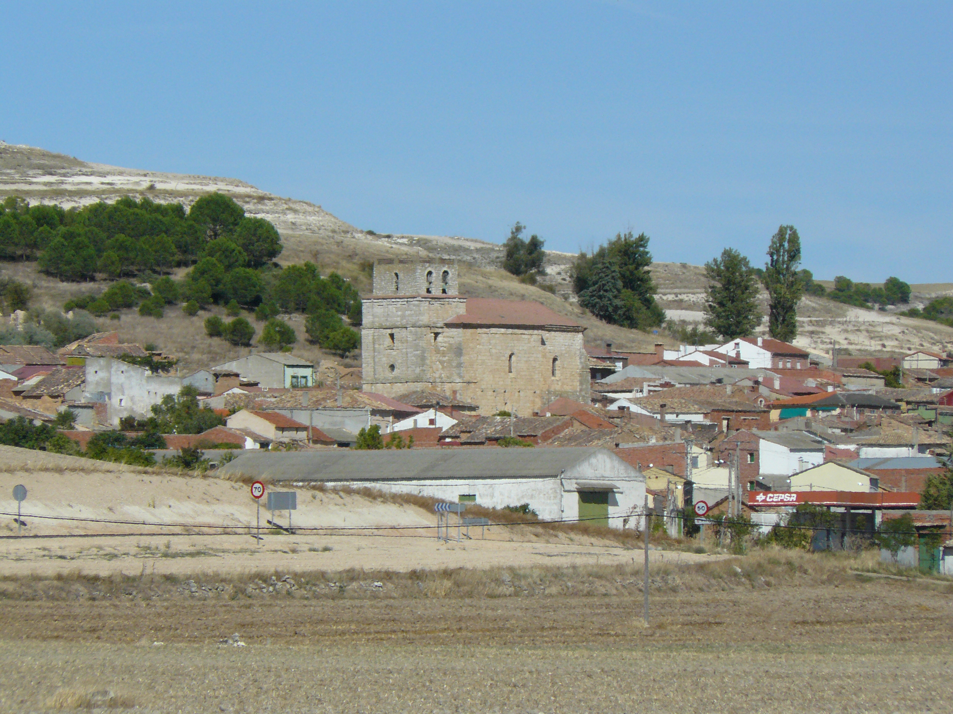 Fombellida, Valladolid.